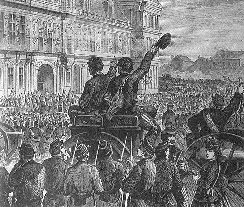 Proclamazione della Comune, Parigi, 28 marzo 1871